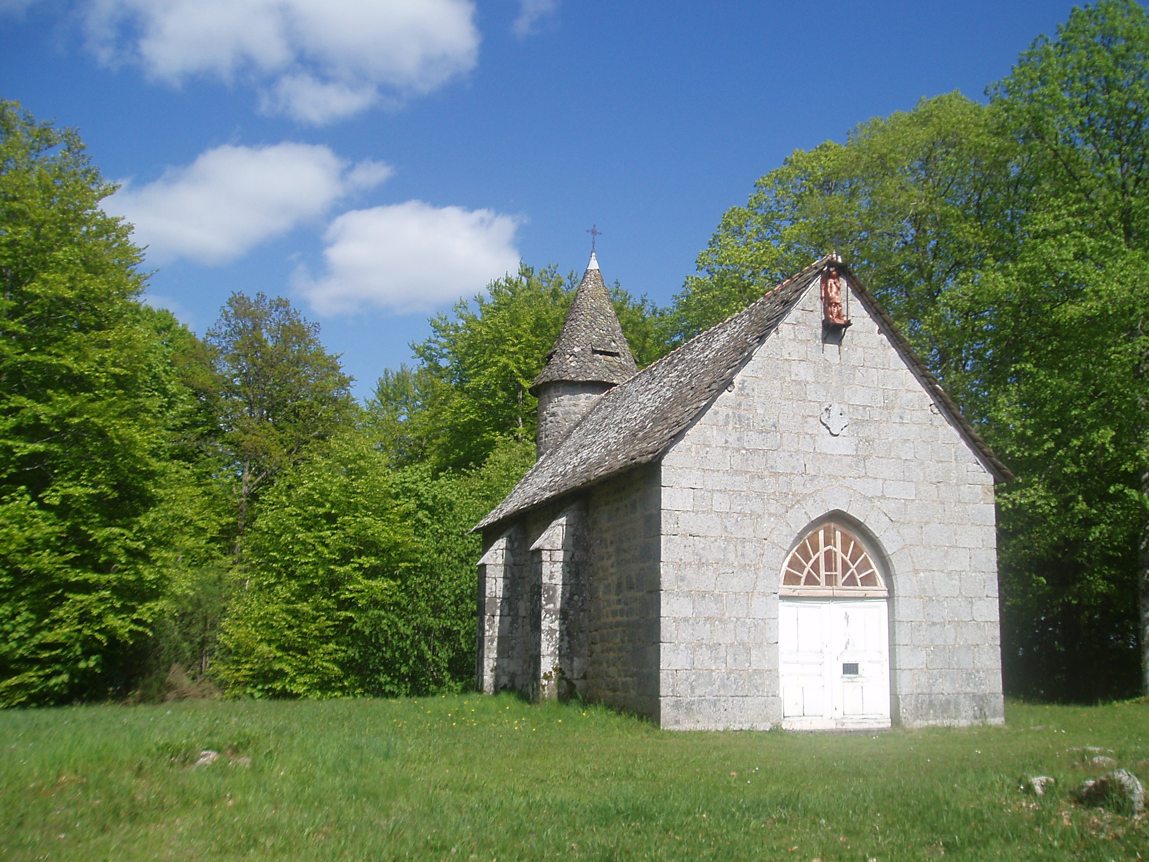 Chapelle du XVe siècle